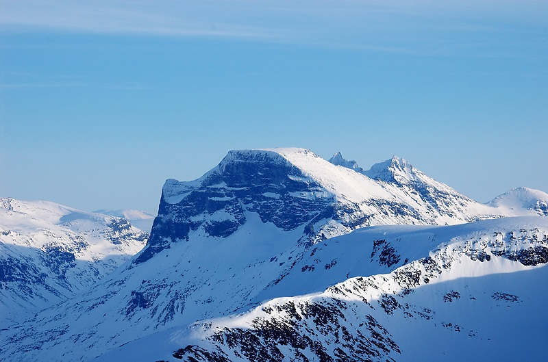 Skarfjellet as seen from Vassnebba, Trollheimen, Norway